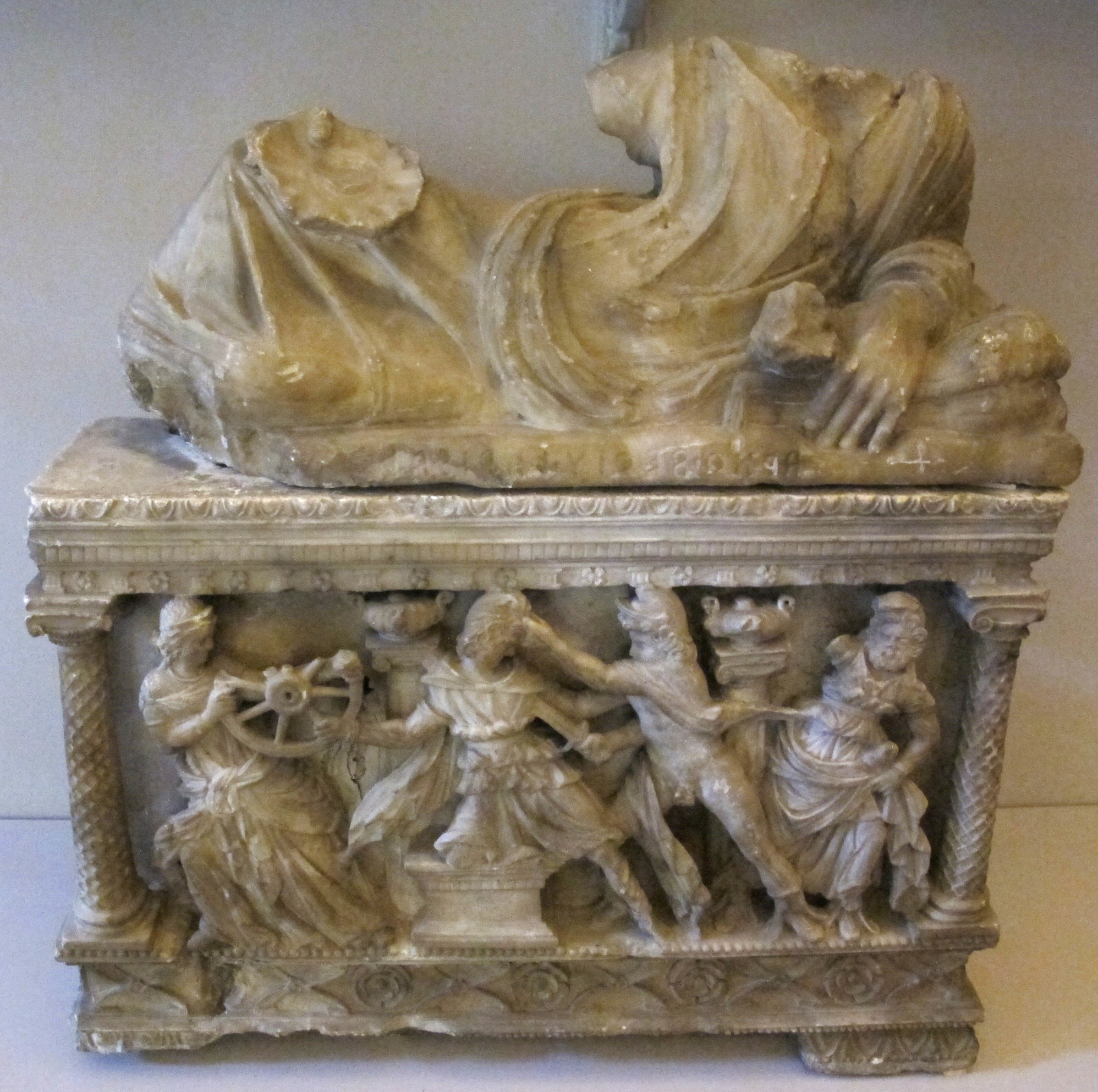 Urna eponima del Maestro di Mirtilo. Sulla base, con colonne ioniche ai lati e architrave finemente decorato, è rappresentata l'uccisione di Mirtilo da parte di Pelope, al centro; a destra un vecchio si ritrae, a sinistra Ippodamia tiene la ruota con la quale Mirtilo cerca di difendersi. Sul fondo altre due colonne ioniche sormontate da lebeti.